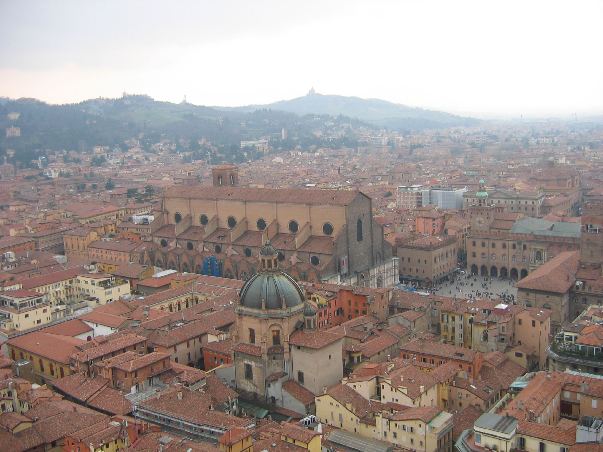 Bologna,Italia